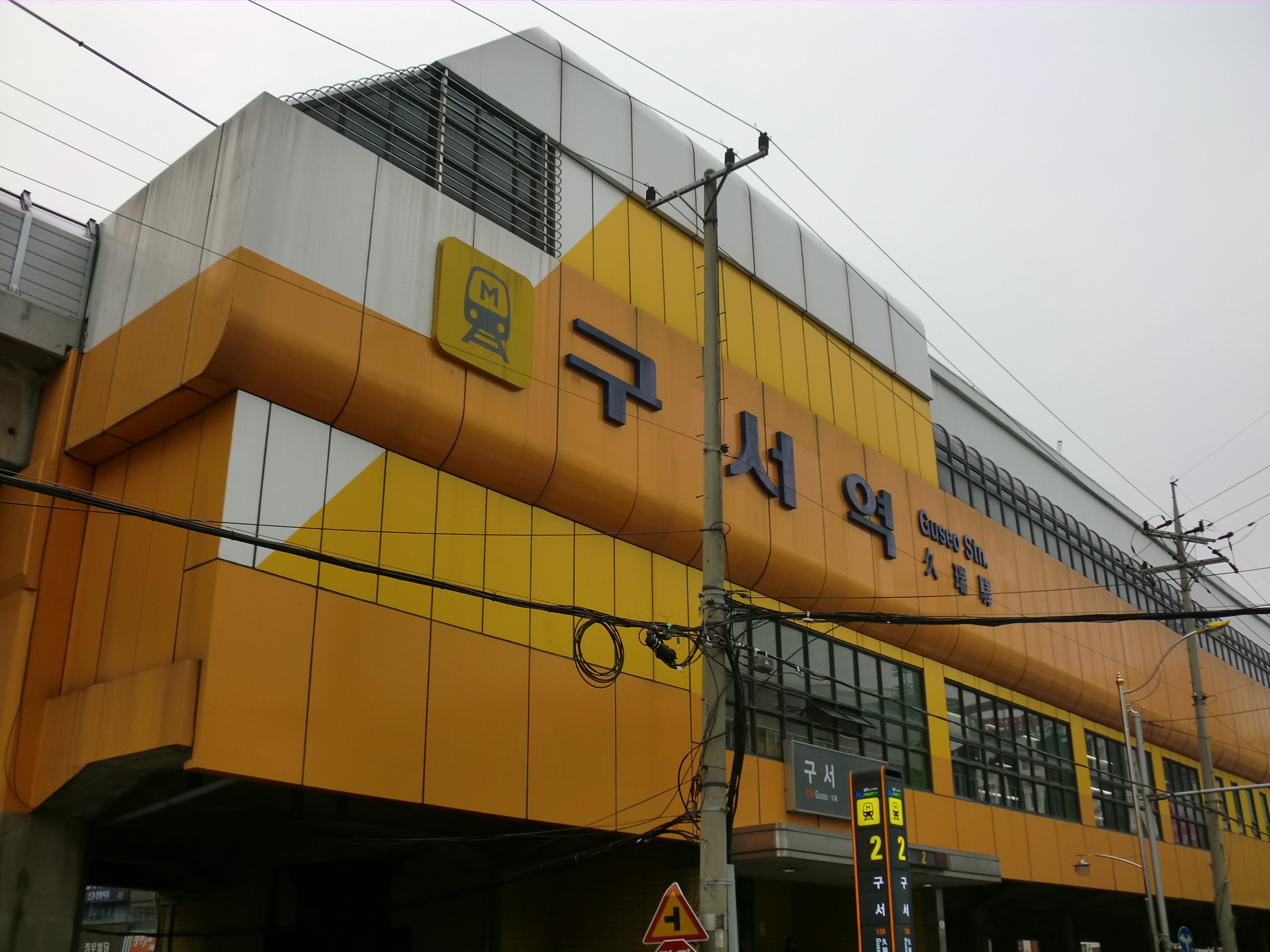 부산도시철도1호선 구서역 2번출구 부근